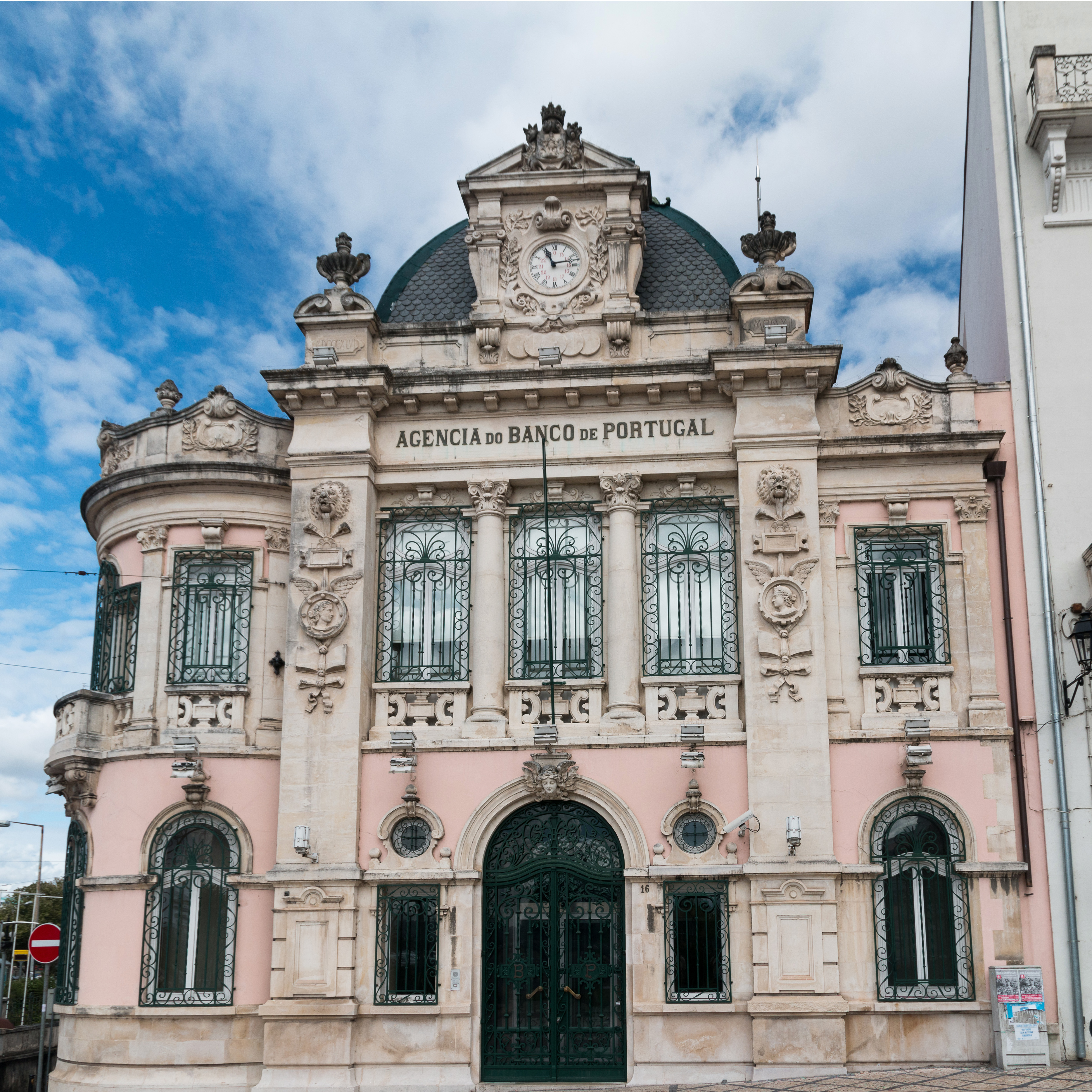 Bank of Portugal, Largo do Portagem.